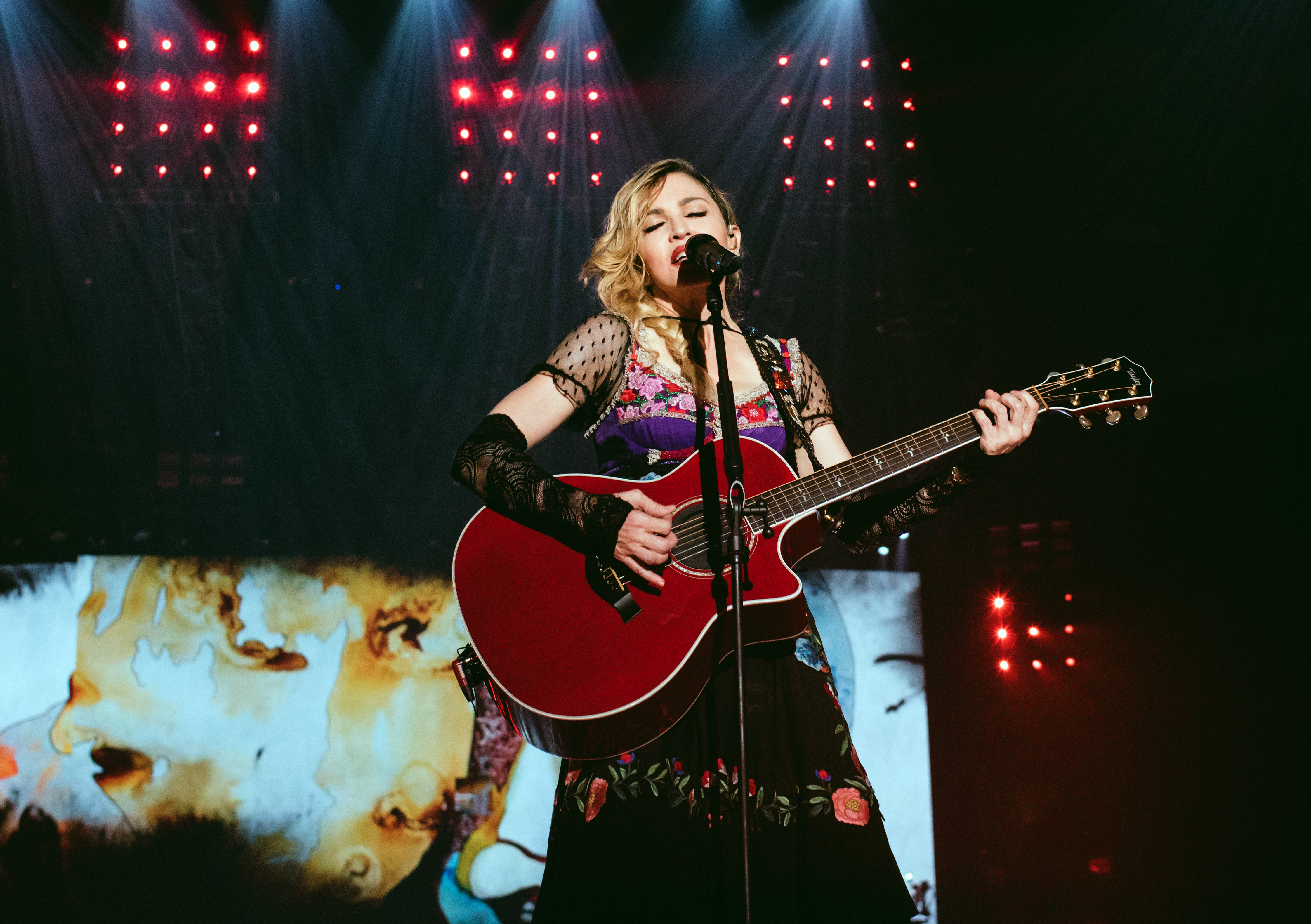 Philadelphia, PA